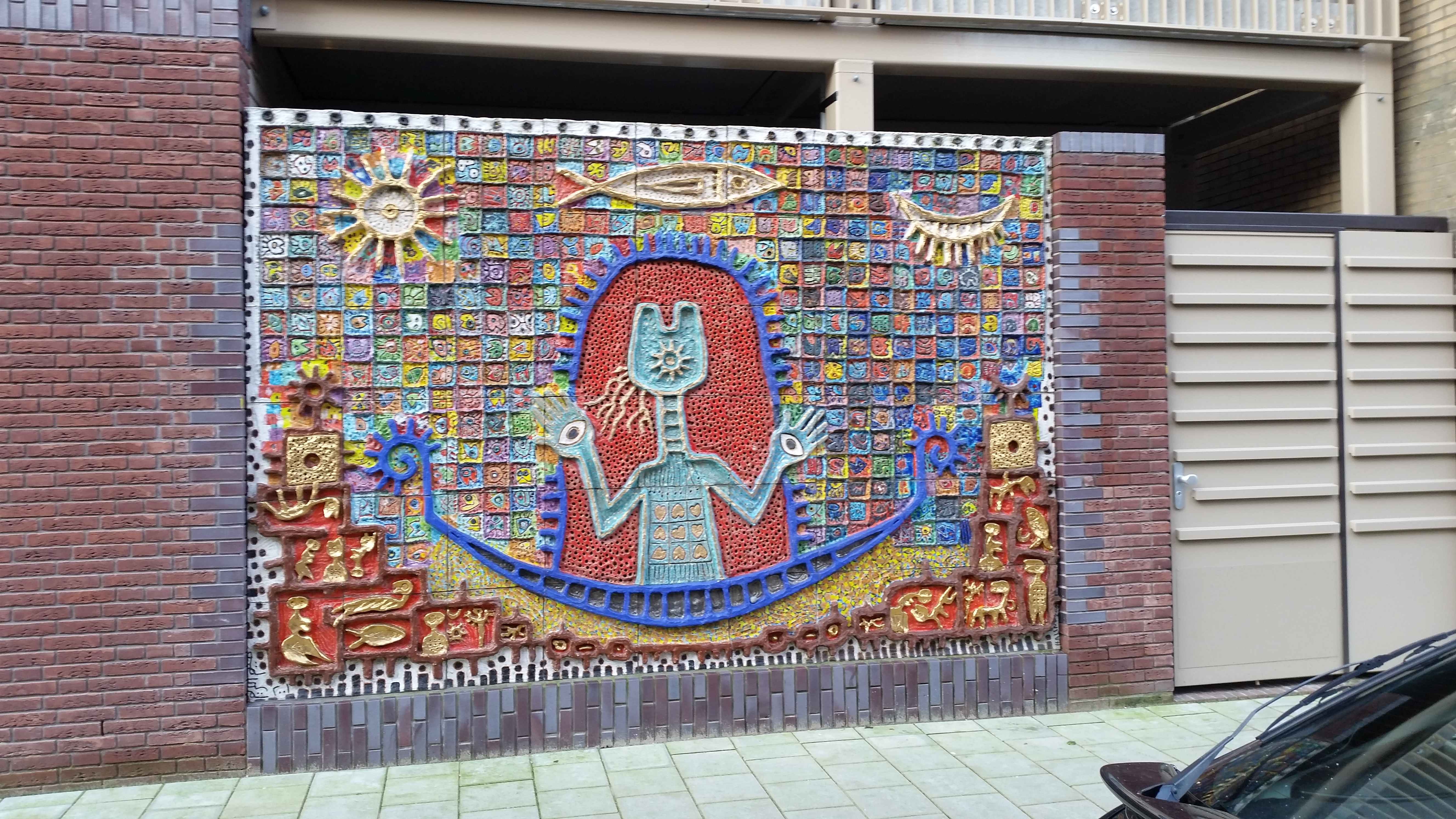 Vijf tableaus in de Jacob van Lennepstraat, hoek Lootsstraat, Amsterdam-West